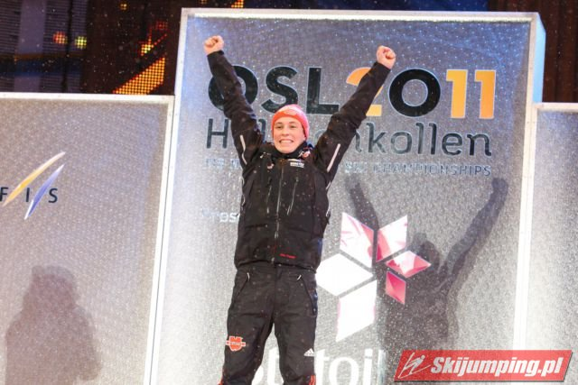 Eric Frenzel podczas ceremonii medalowej po konkursie indywidualnym (Gundersen - skok na obiekcie HS106 + bieg na 10 kilometrów) w ramach Mistrzostw Świata w Narciarstwie Klasycznym 2011 w Oslo.